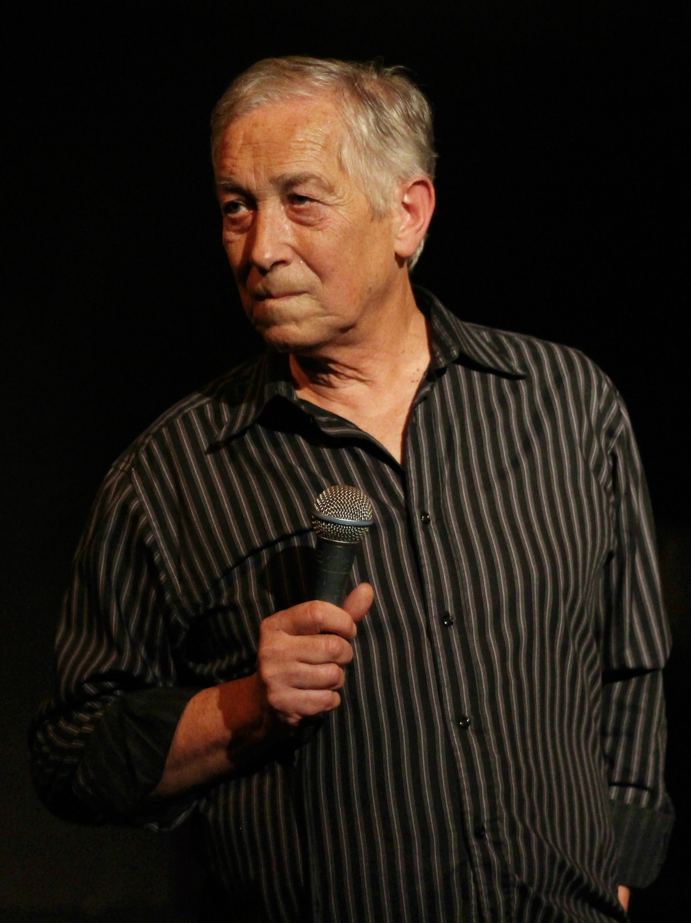 Reżyser teatralny Lech Raczak w Klubie pod Minogą w Poznaniu podczas dyskusji z widzami po spektaklu Spisek smoleński.